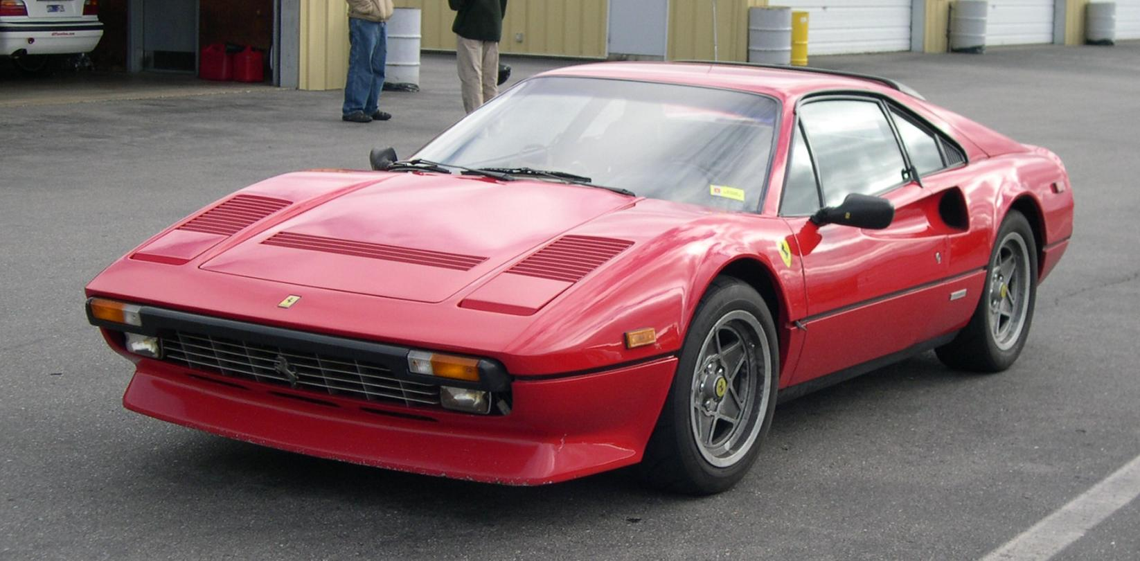 1984 Ferrari 308 GTB quattrovalvole